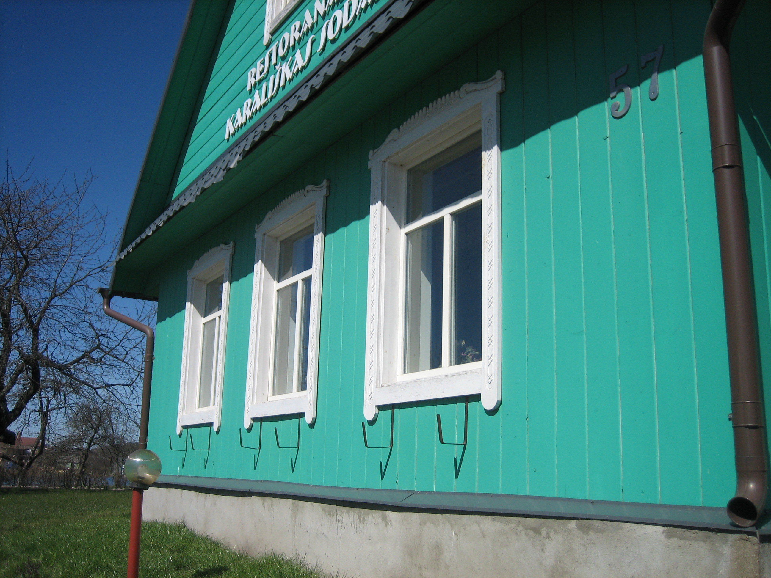 Tre fönster signalerar karaimiskt hus i Trakai.